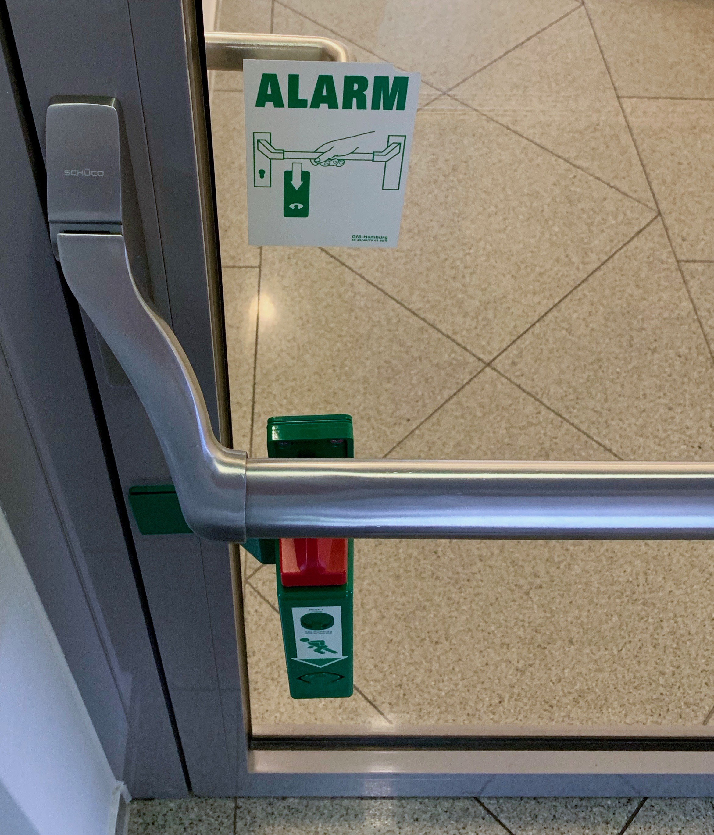 Der Notausgang lässt sich durch Drücken der Stange öffnen. Hier erfolgt zudem die Auslösung eines Alarms.